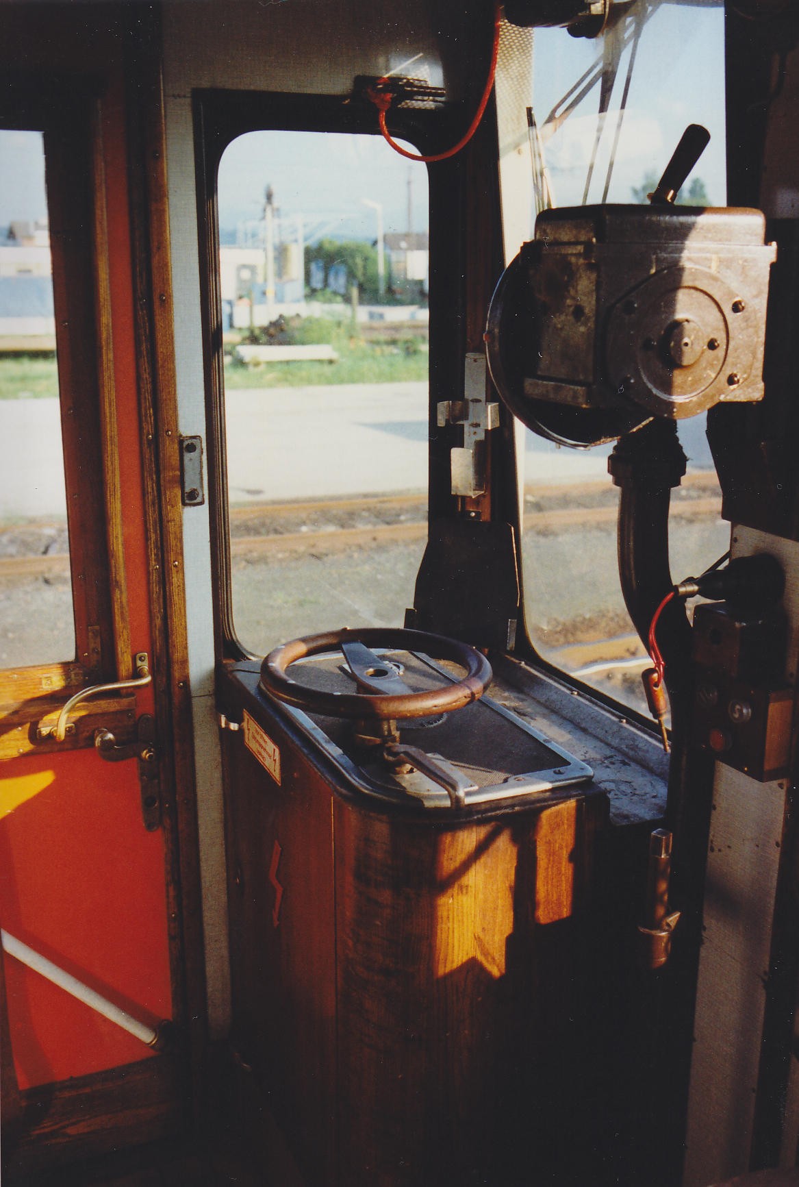 Stern & Haffel ET 25 102 Führerstand